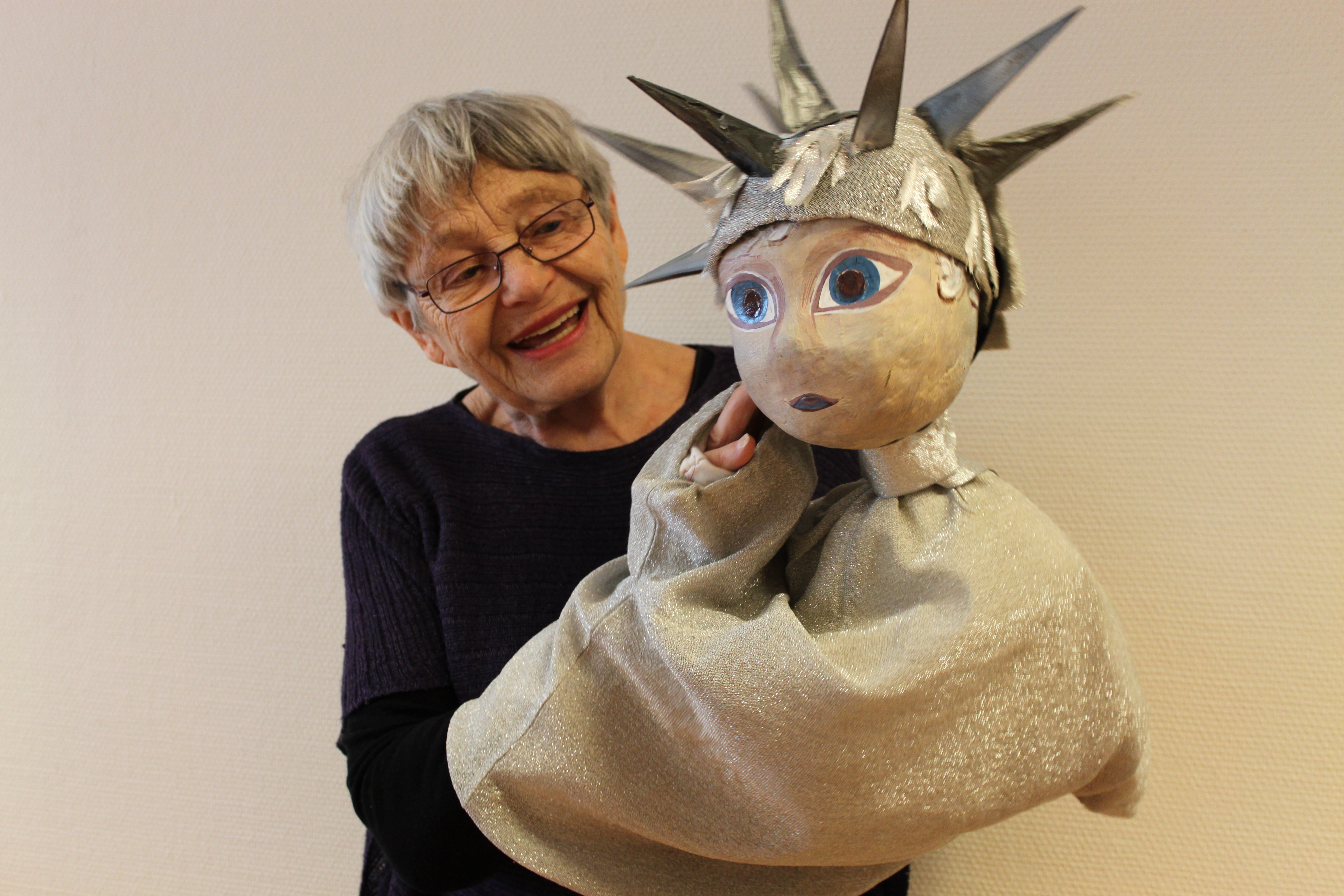 Smykkekunstner og dukkemaker Ute de Lange Nilsen med dukken Solungen. Bildet tatt i Arendal bibliotek ifm Stemmerettsjubileet 2013 og utstillingen "Med kunsten som stemme" i regi av AAbk.